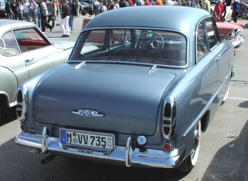 Ford Taunus 12m (G13) (1952-1955)